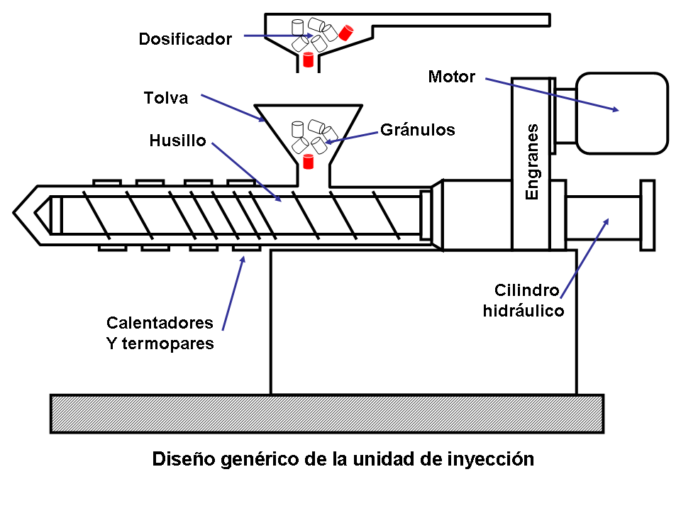 Unidad de inyección para una inyectora de plástico